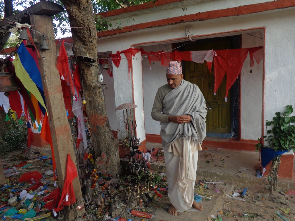 नेपाल भाषा: With Pujari of Gwasi Samaij dewata